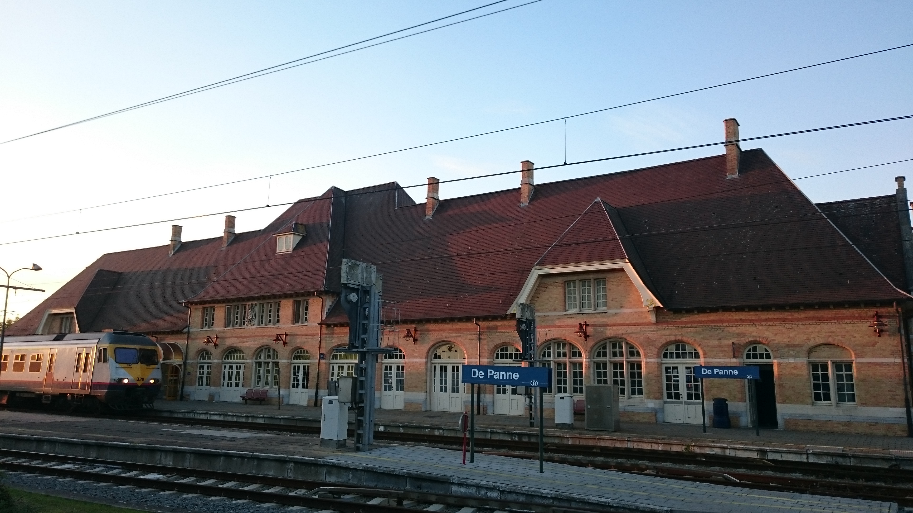 La gare de La Panne, à Adinkerque, vue depuis le sud en 2016.